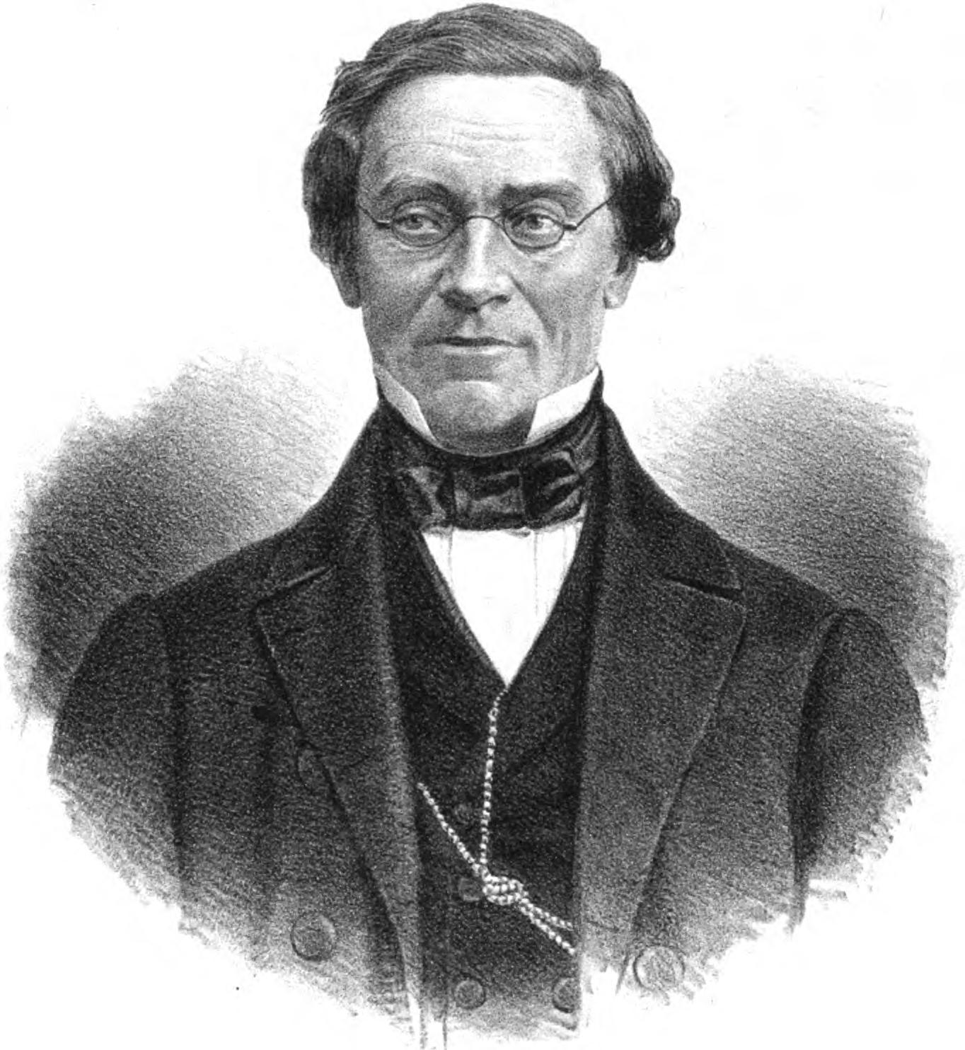 Filosofen Christofer Jacob Boström.